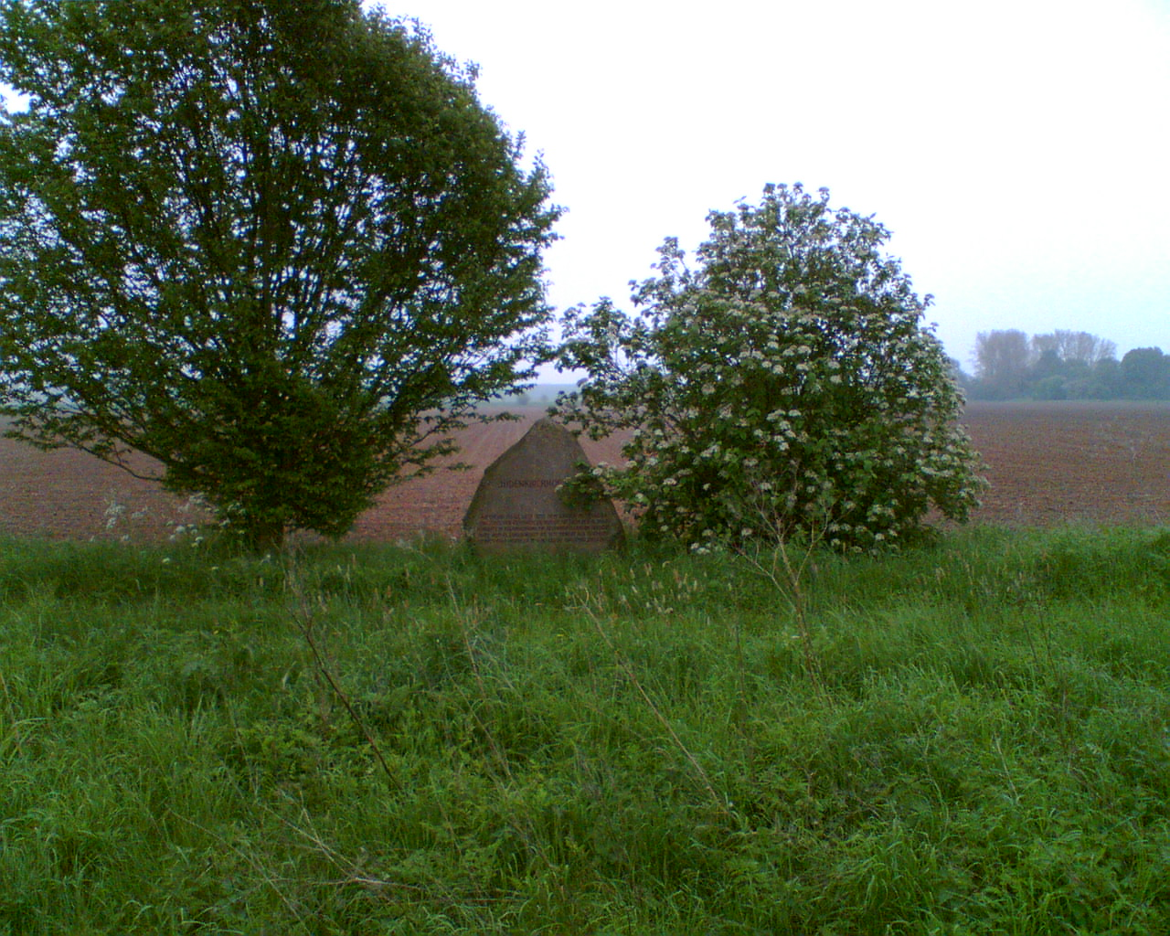 Gedenkstein am Standort des ehemaligen jüdischen Friedhofes am Judenkirchhofsfeld an der Südseite der Bundesstraße 3 zwischen Einbeck und Salzderhelden